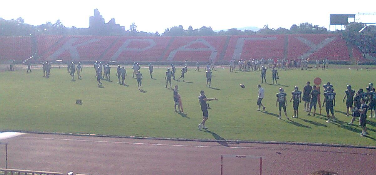 Srpski (latinica): Utakmica Kragujevac Wild Boars - Vukovi Beograd igrana u Kragujevcu